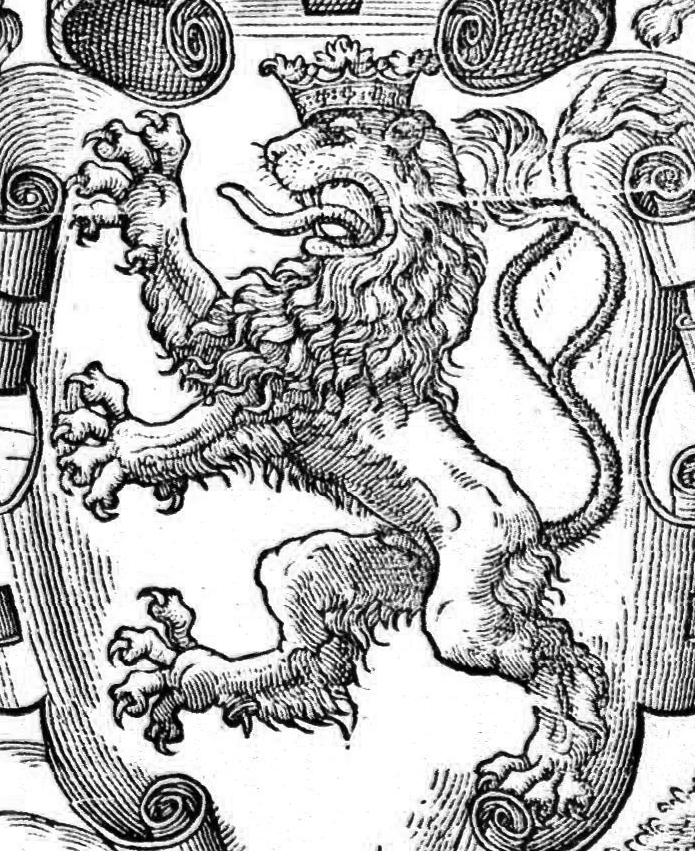 This photograph is in the public domain because according to the Art. 3 of copyright law of March 29, 1926 of the Republic of Poland and Art. 2 of copyright law of July 10, 1952 of the People's Republic of Poland, all photographs by Polish photographers (or published for the first time in Poland or simultaneously in Poland and abroad) published without a clear copyright notice before the law was changed on May 23, 1994 are assumed public domain in Poland. This work is in the public domain in the United States because it meets three requirements: it was first published outside the United States (and not published in the U.S. within 30 days), it was first published before 1 March 1989 without copyright notice or before 1964 without copyright renewal or before the source country established copyright relations with the United States, it was in the public domain in its home country (Poland) on the URAA date (1 January 1996). To uploader: Please provide where and when the image was first published.